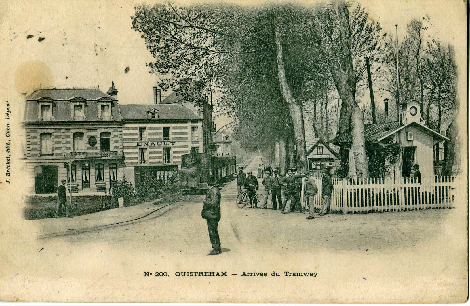 Carte postale ancienne éditée par Bréchet, N°200Ouistreham - Arrivée du Tramwau